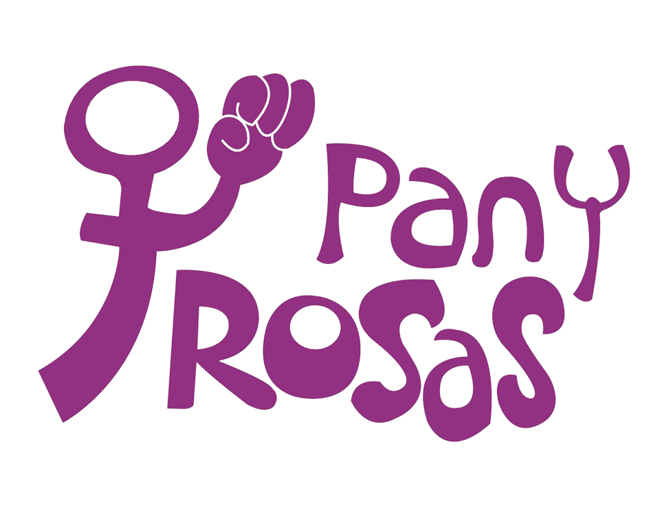 Logo de la agrupación feminista Pan y Rosas